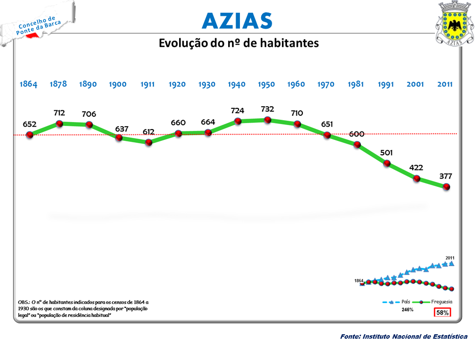 Censos 1864/2011